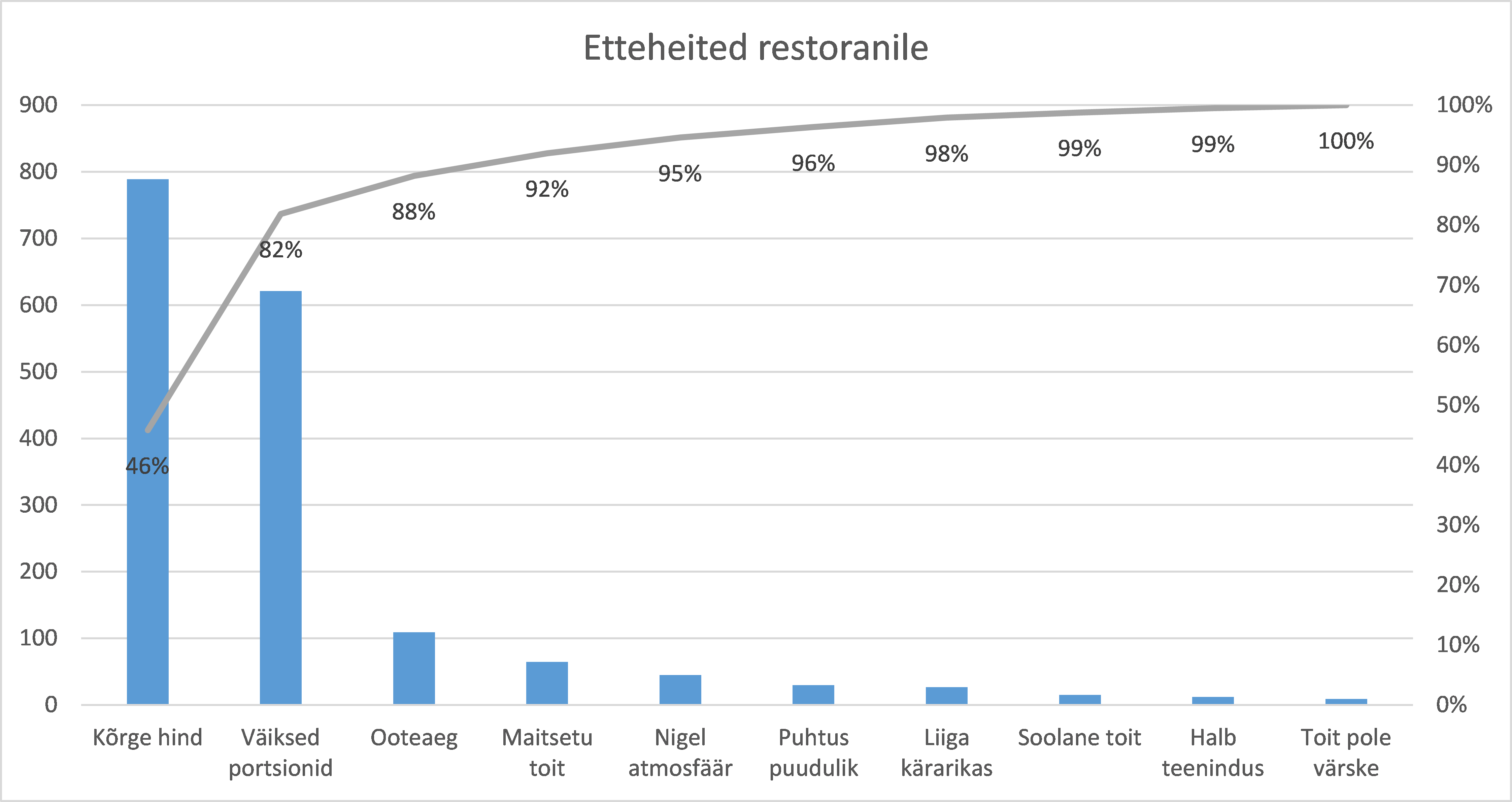 Pareto diagrammi näide